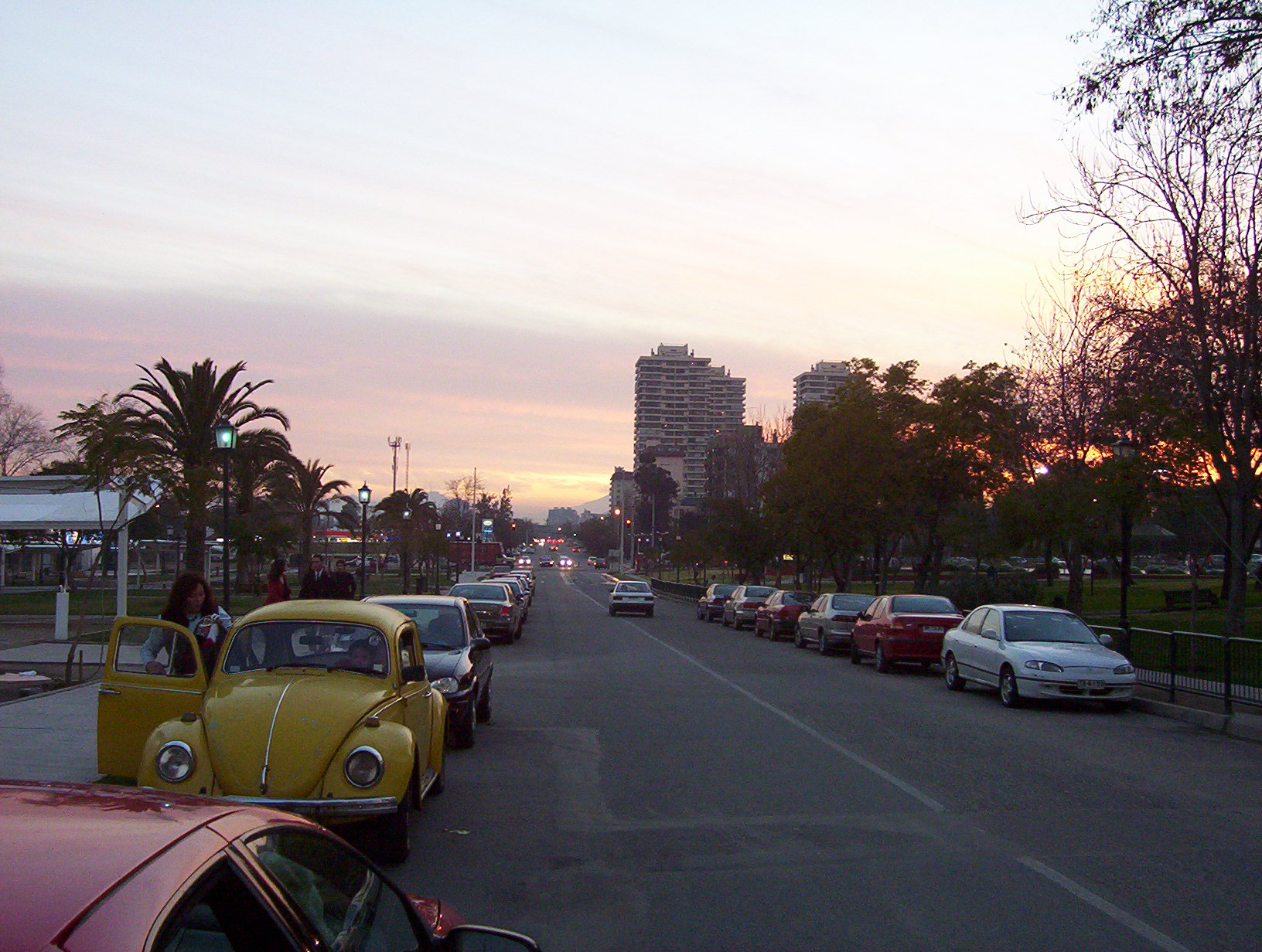 Avda Apoquindo hacia el Oeste desde la Iglesia de los Dominicos